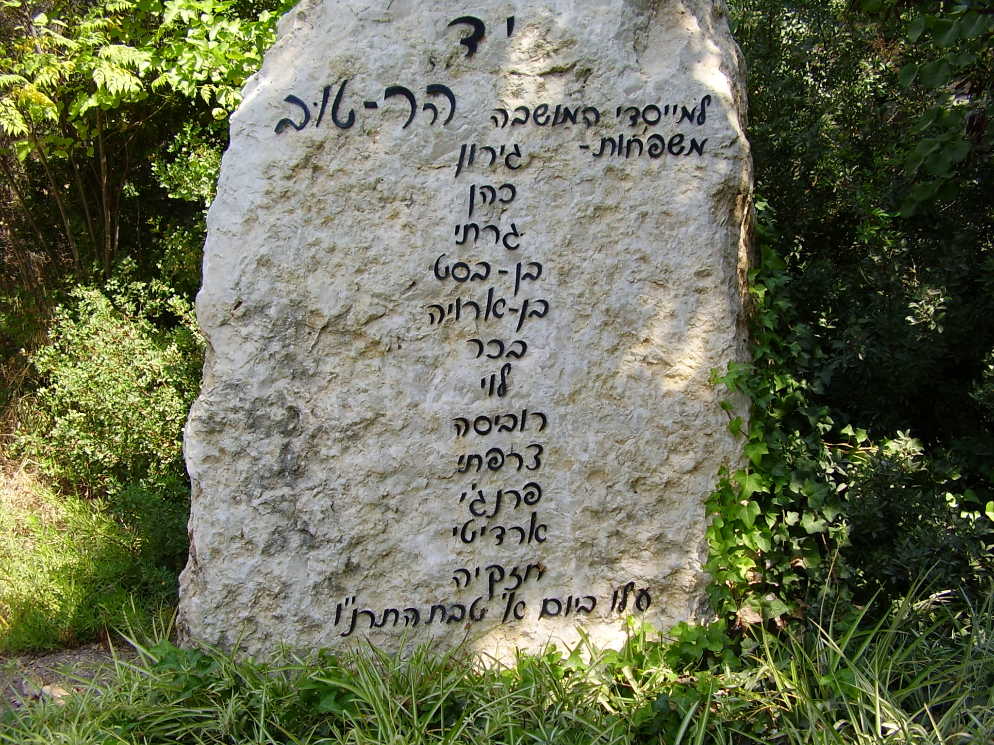 memorial stone, hartuv, israel